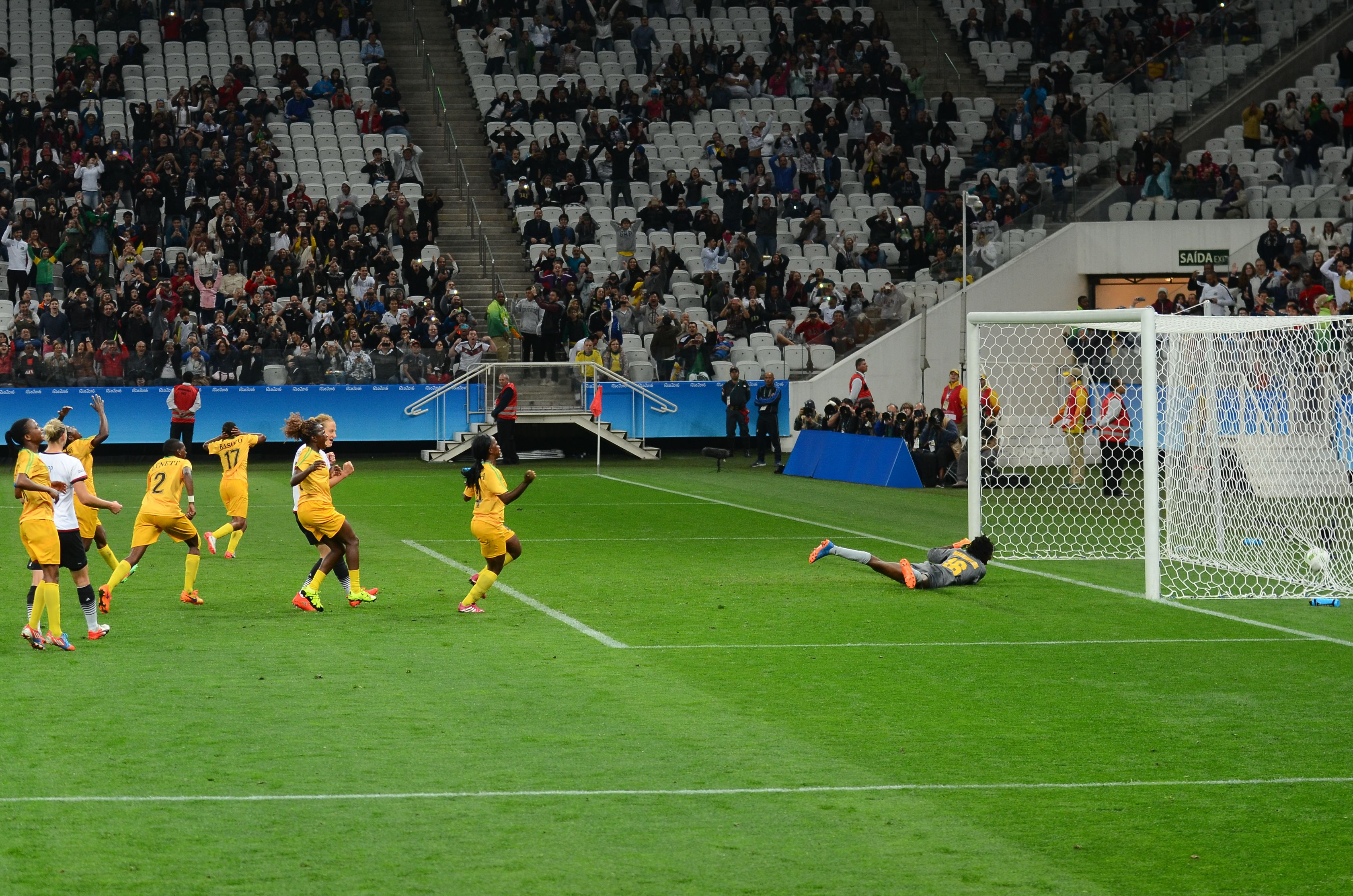 Futebol feminino de Zimbábue e Alemanha se enfrentam em SP